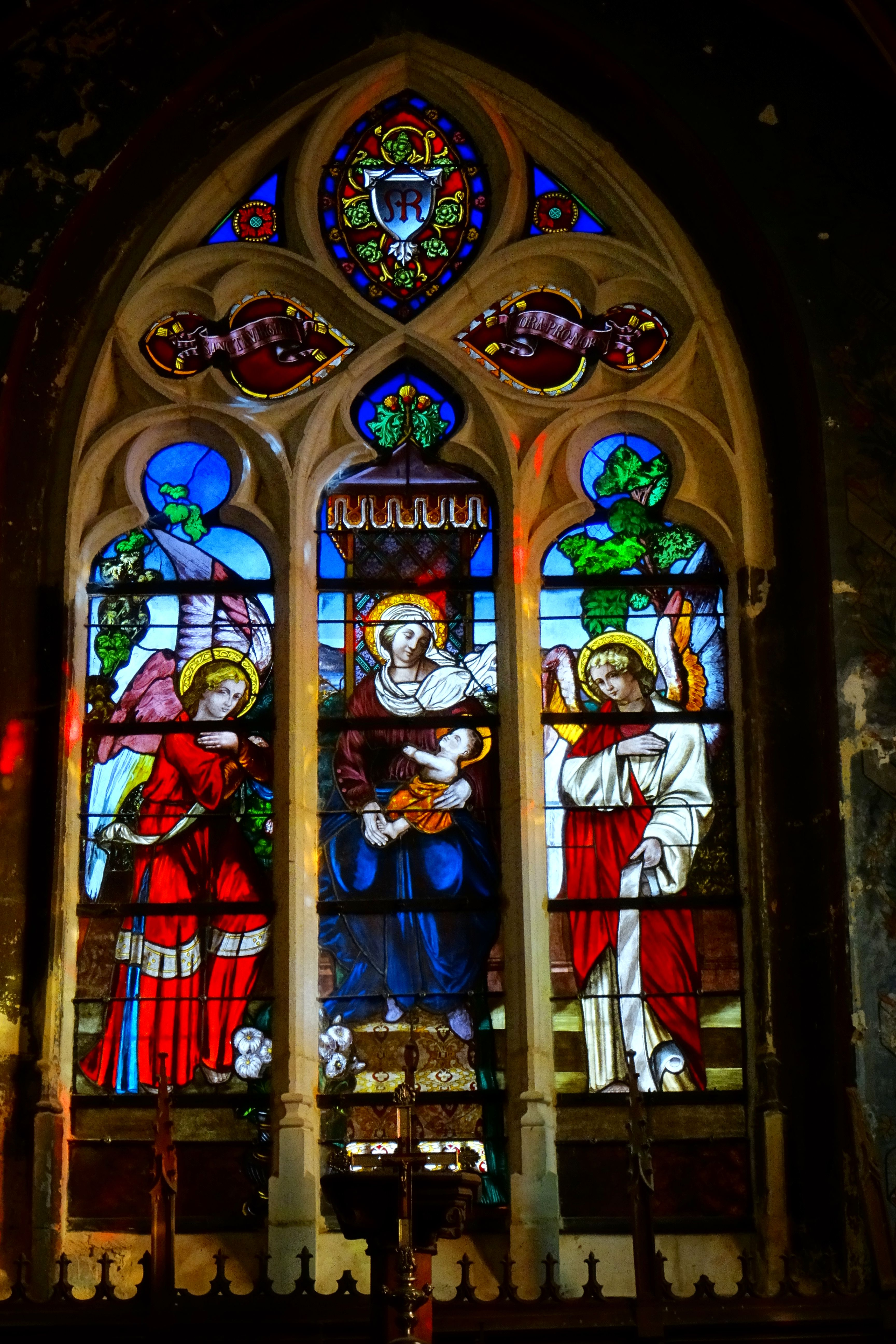 Chapelle latérale sud, 2e travée (chapelle de la Vierge), verrière n° 6 (côté est) - l'Assomption de la Vierge, par Joseph-Dieu Ména, Ménilmontant, 1868.